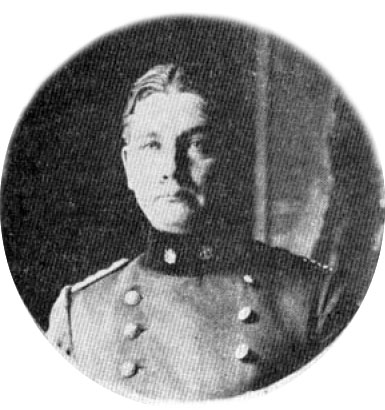 Manuel Ávalos Prado (2 de agosto de 1885 - † 3 de enero de 1919) Militar y aviador chileno. Primer director de la Escuela de Aviación.